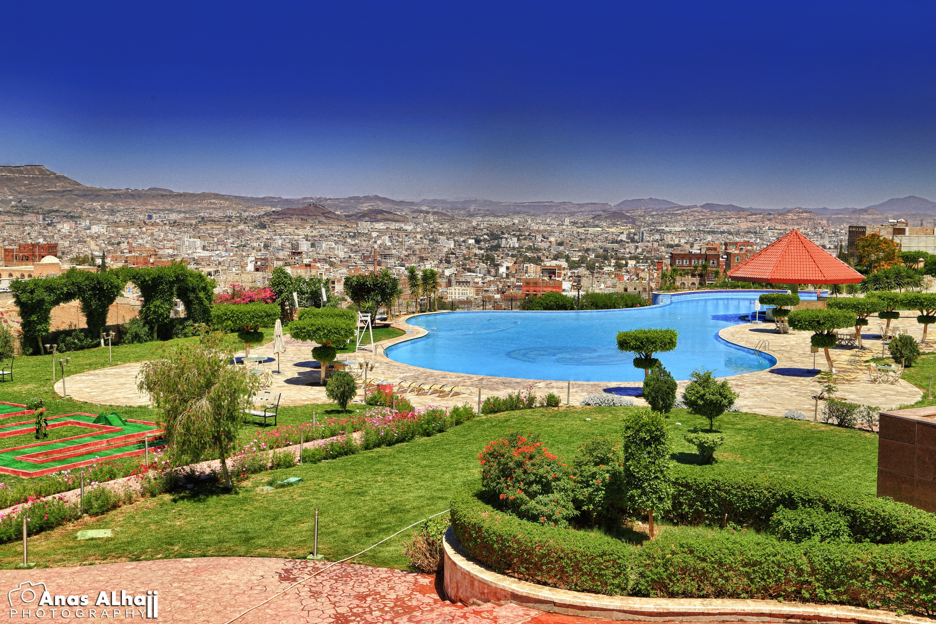 Mövenpick Hotels - Sana'a